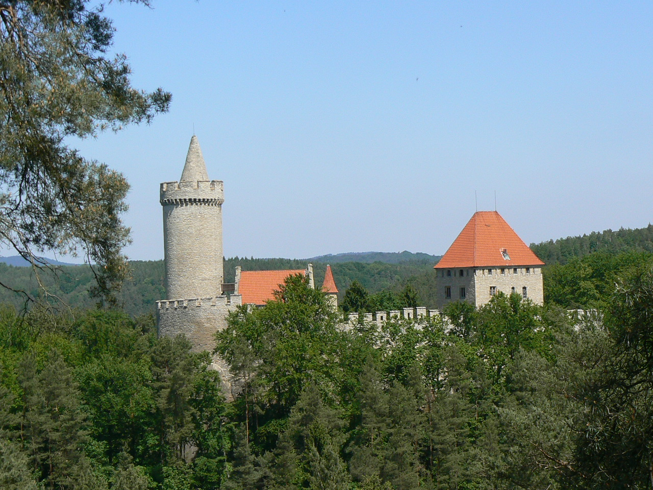 Panorama hradu Kokořín (Panorama von der Burg Kokorschin, Panorama of Kokořín Castle)